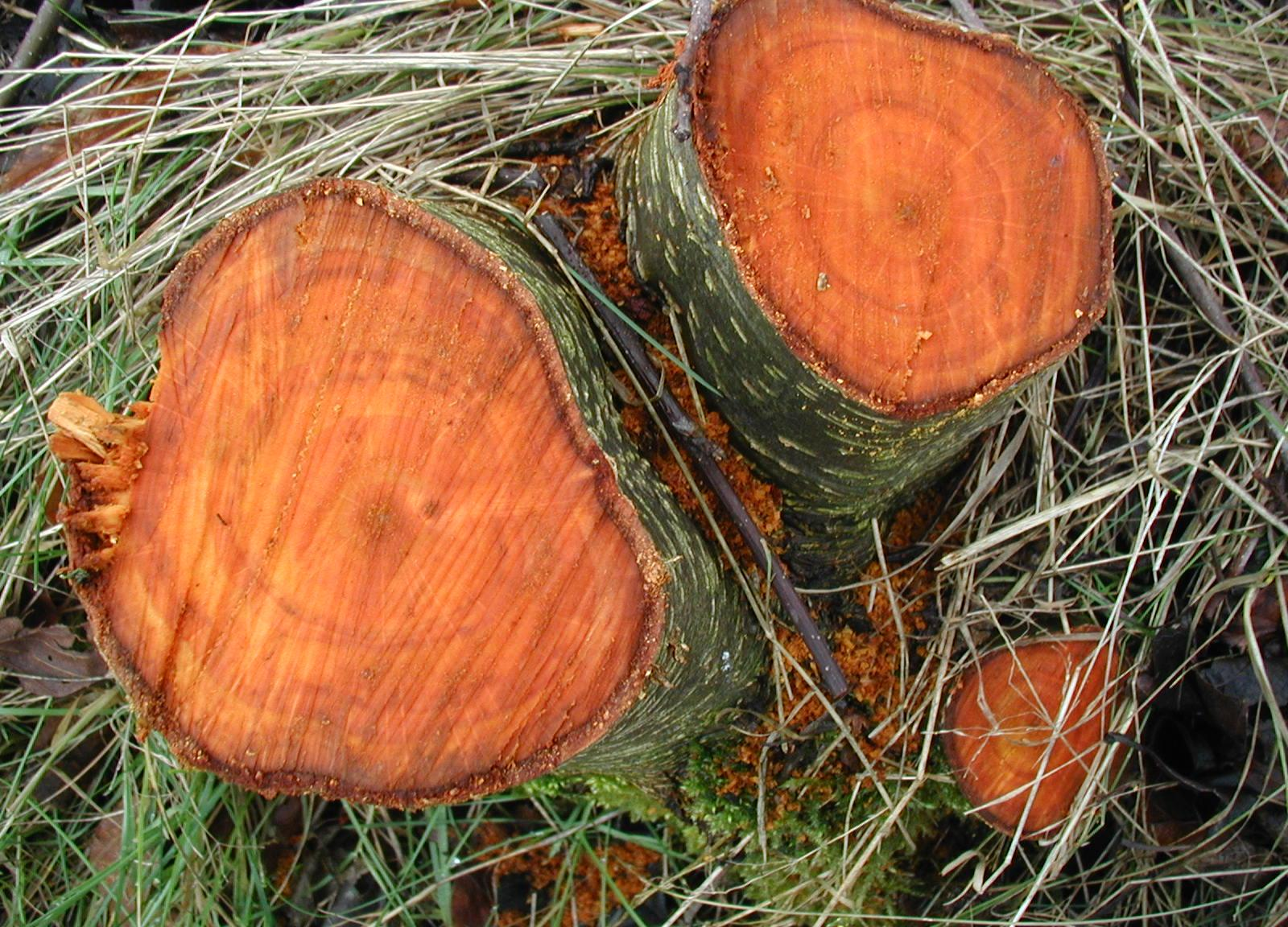 Alnus glutinosa: Wood